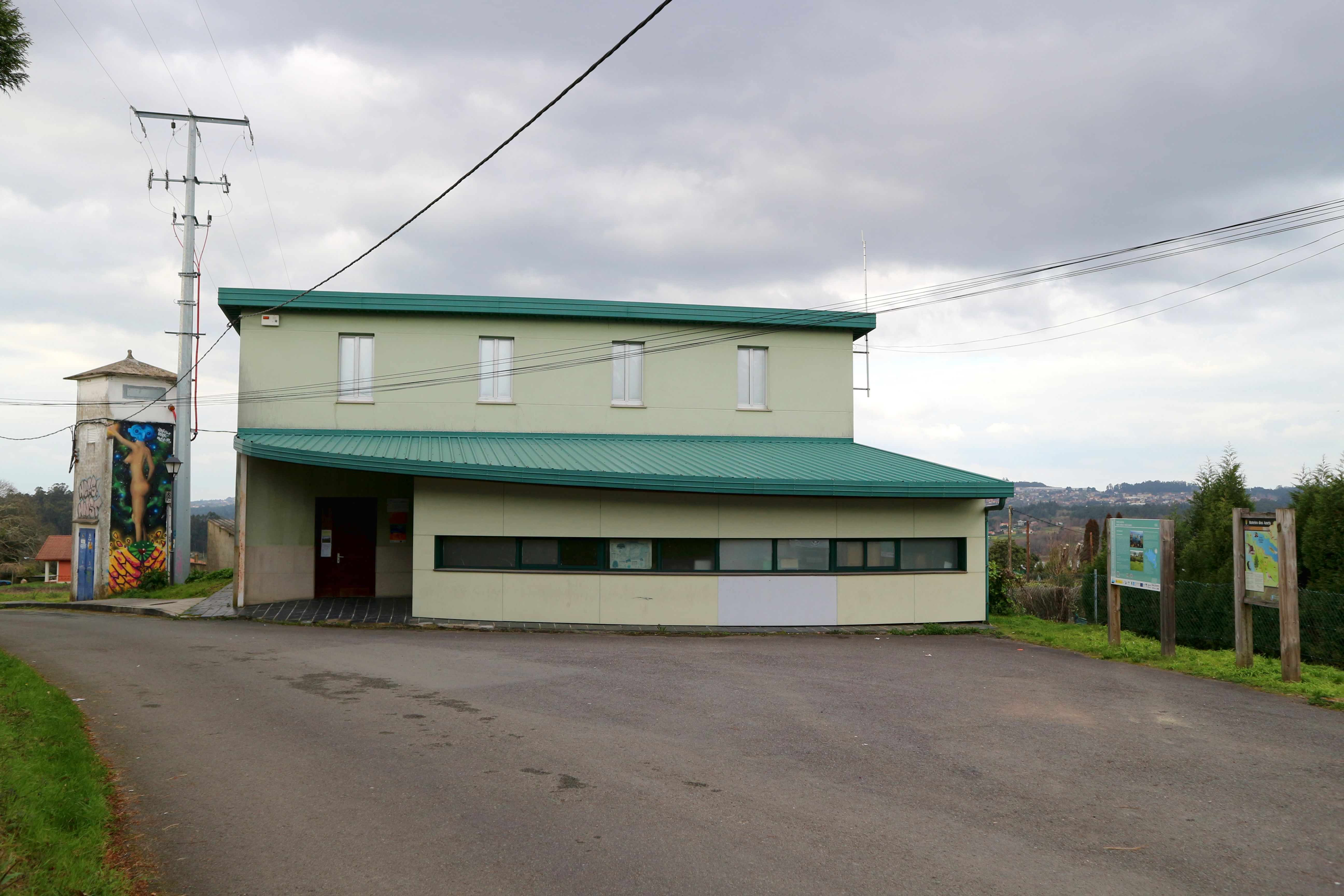 Aula da Natureza en Crendes, Abegondo.